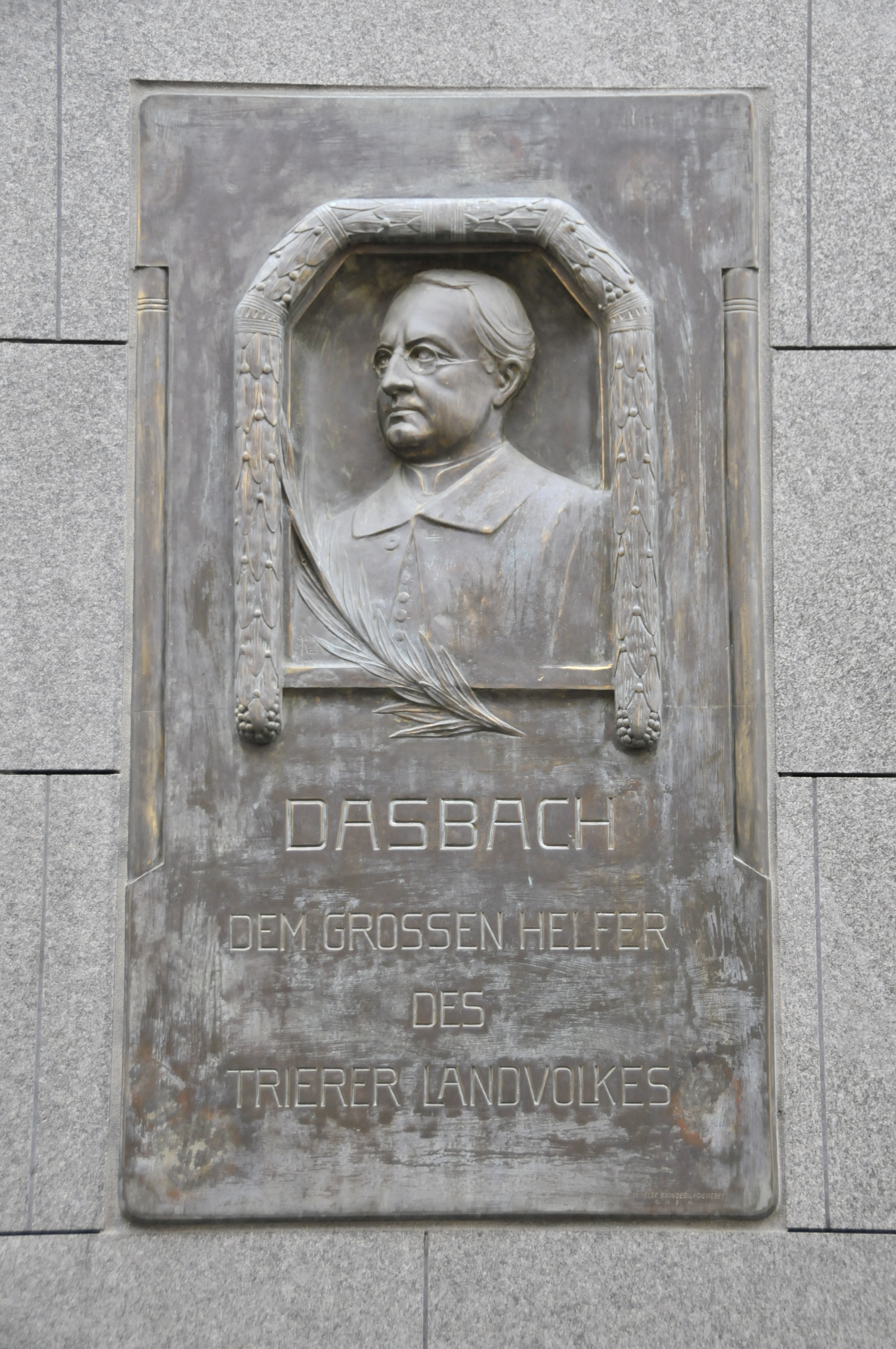 Gedenktafel für Friedrich Dasbach in Trier